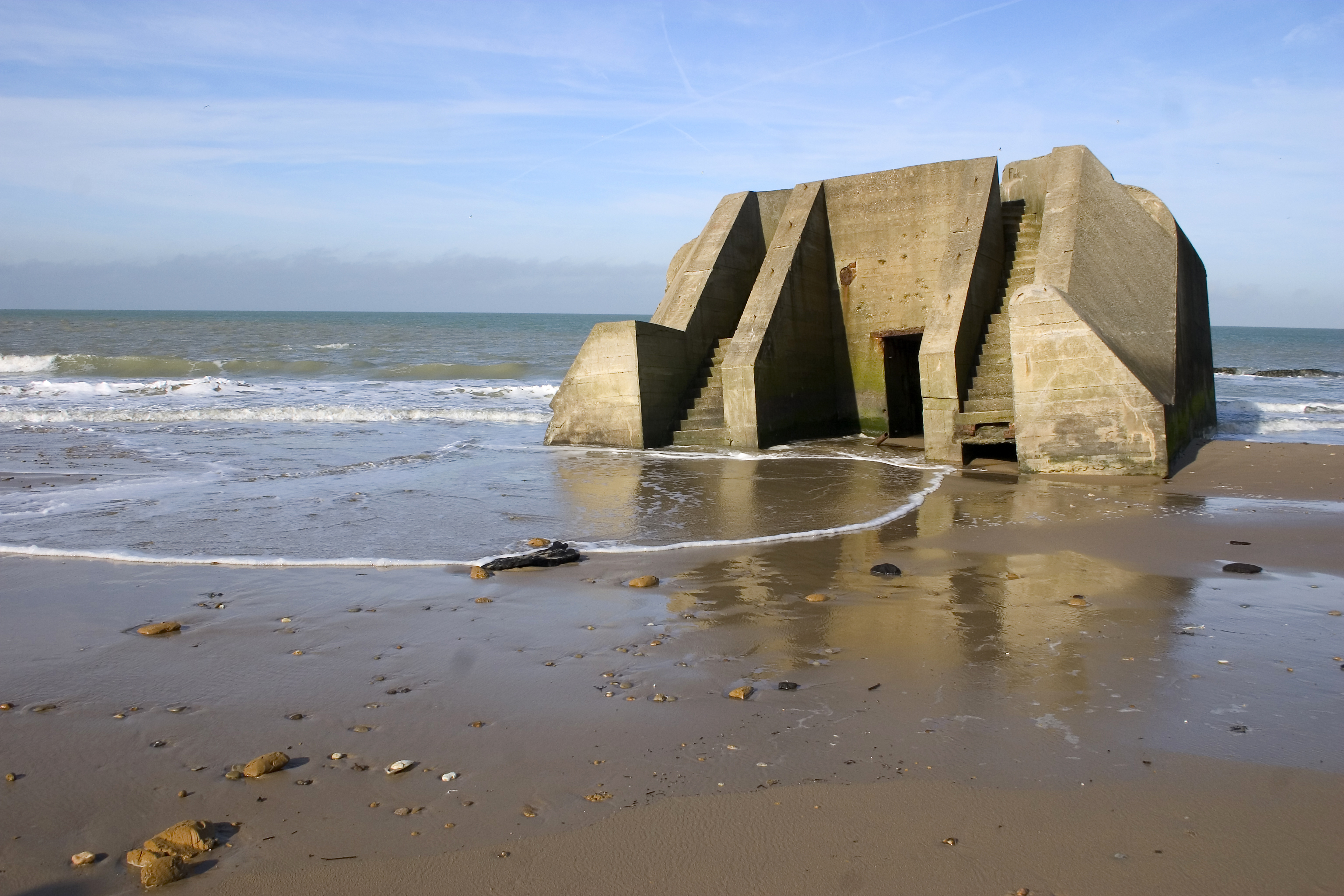 La mer a dépassé les blockhaus à Wissant